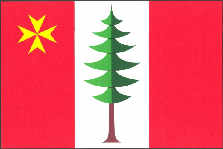 vlajka, Jedlí, okres Šumperk